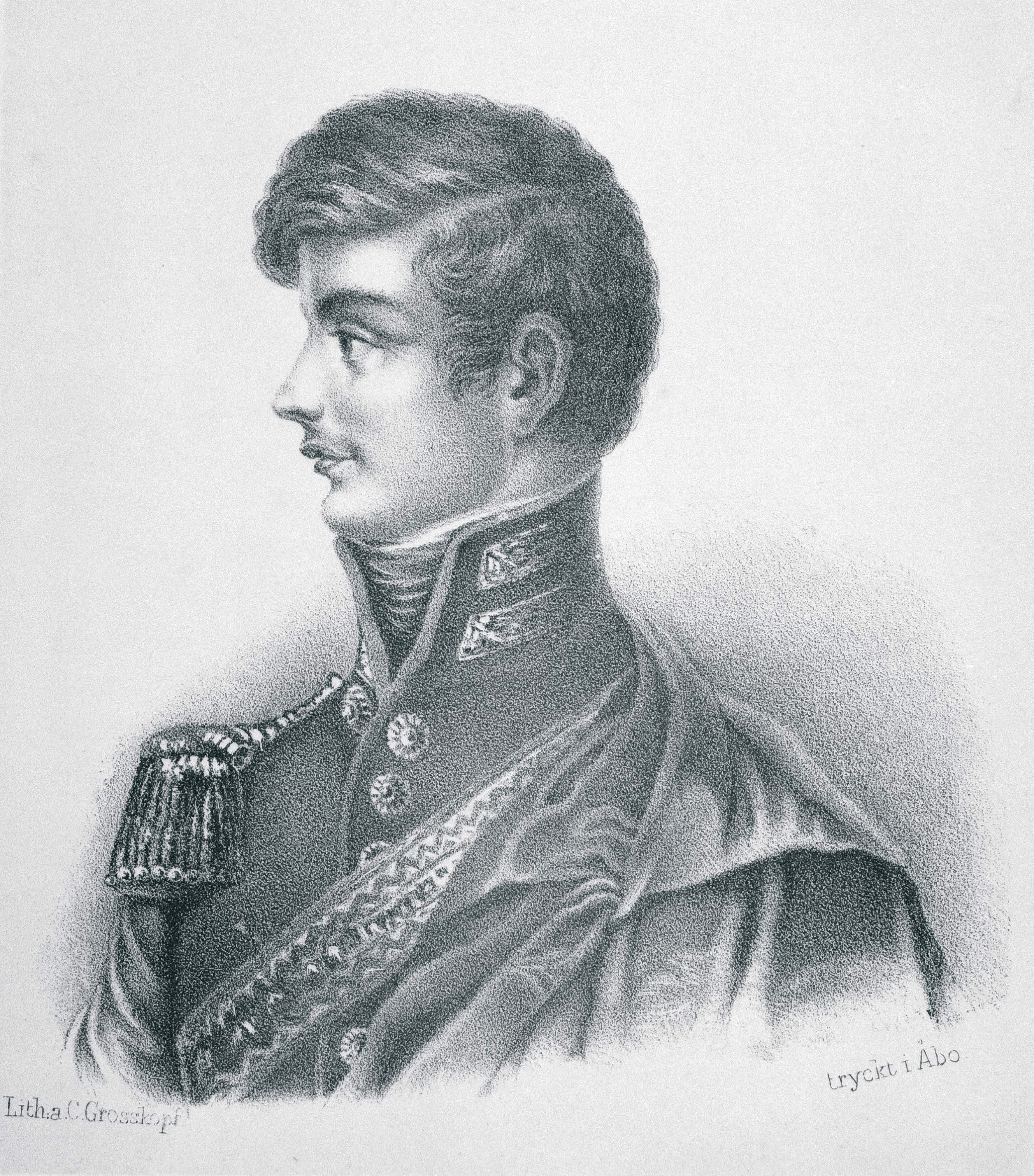 Aliluutnantti Wilhelm von Schwerin, kivipiirros, julkaistu teoksessa Porträtter till Fänrik Ståls sägner.